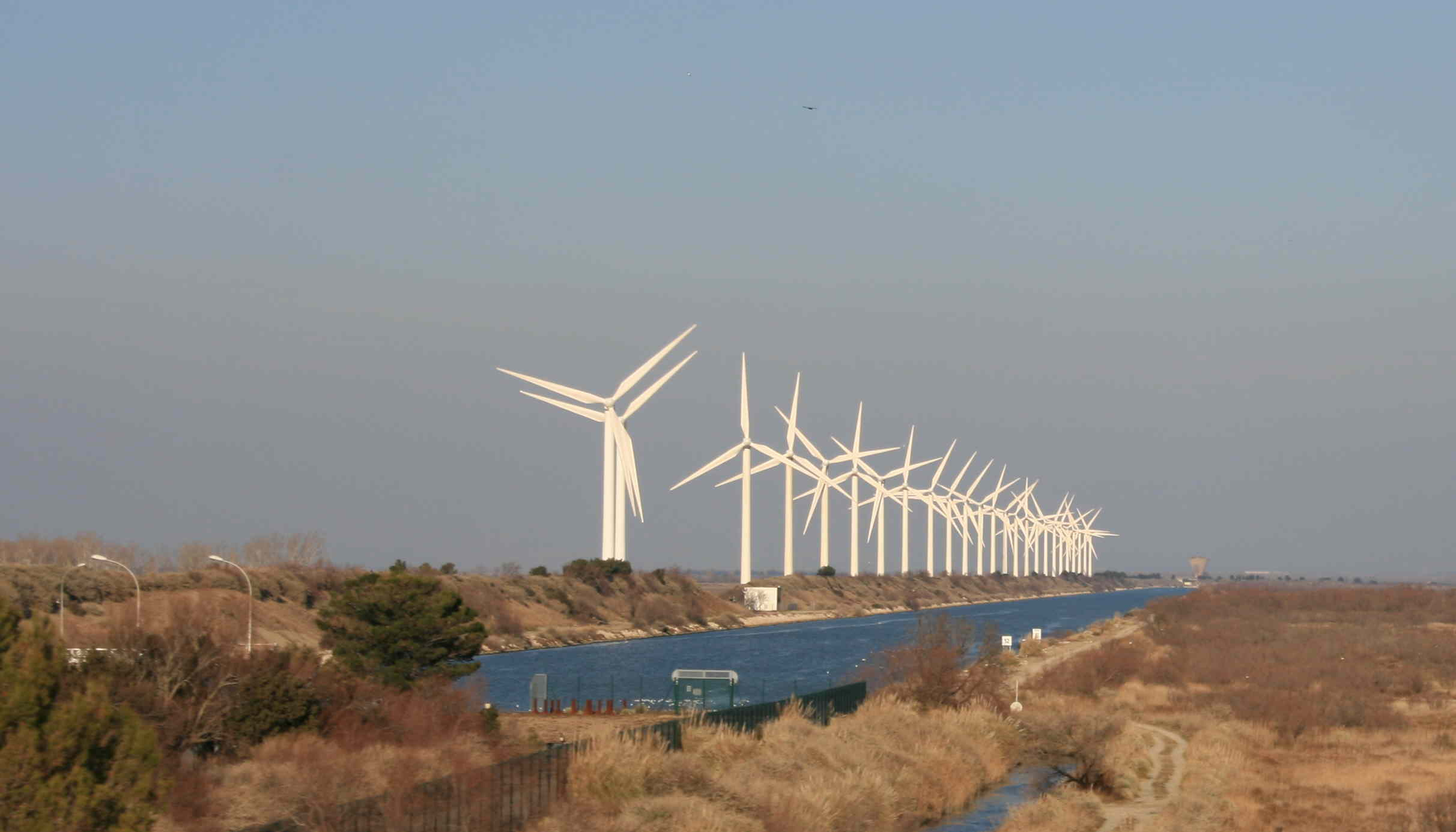 Eoliennes à proximité du Grand-Rhône